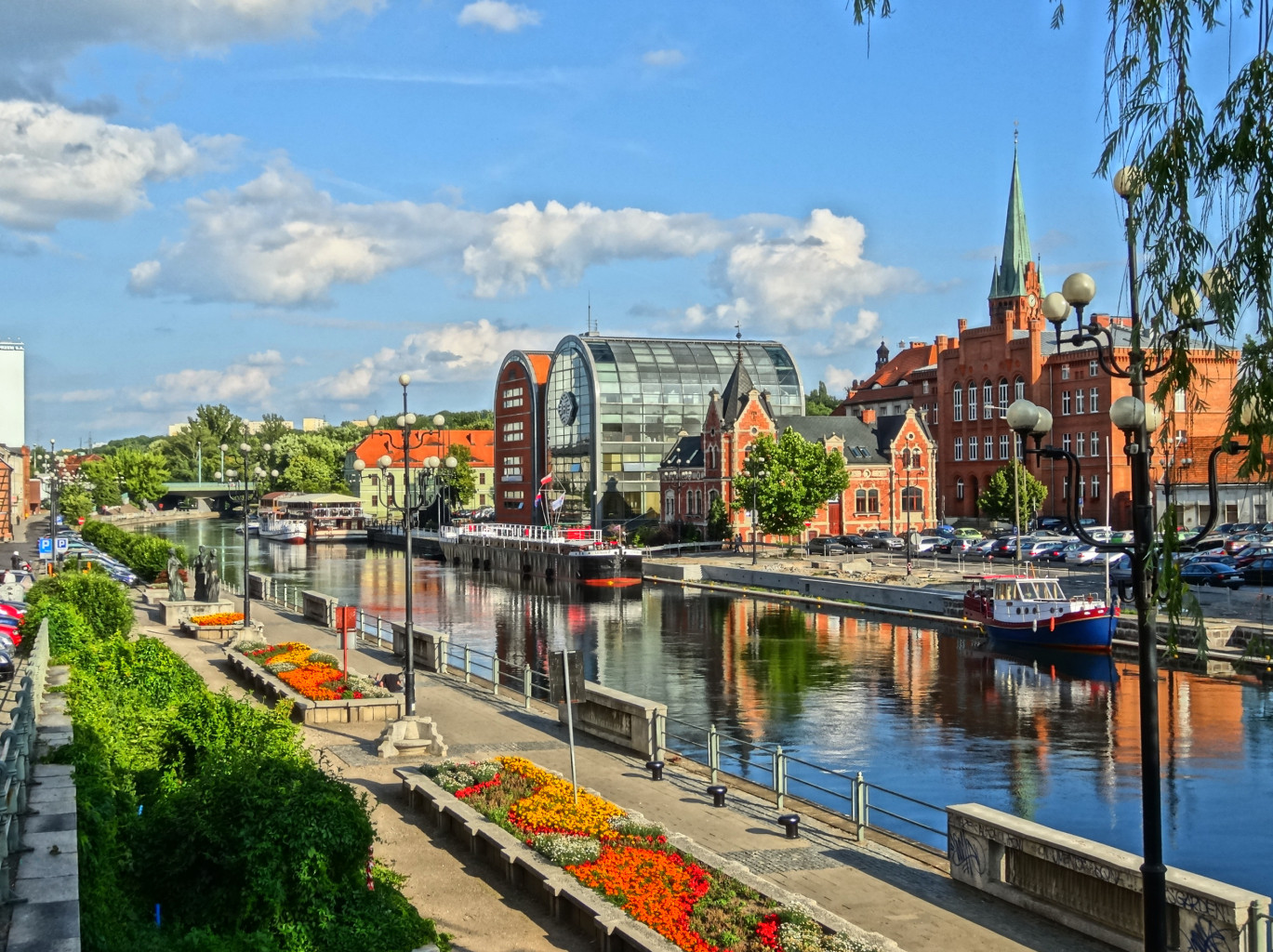 Widok z mostu Staromiejskiego im. Jerzego Sulimy-Kamińskiego w Bydgoszczy. Brda w centrum miasta.